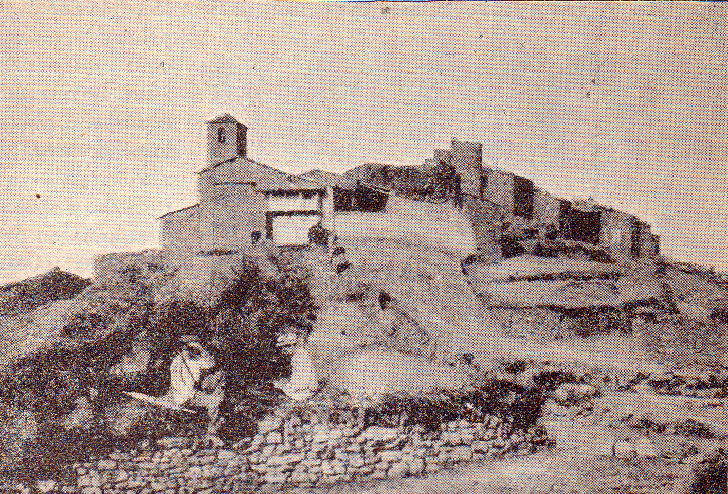 Fotografia antiga del poble de Claverol (Conca de Dalt, Pallars Jussà)